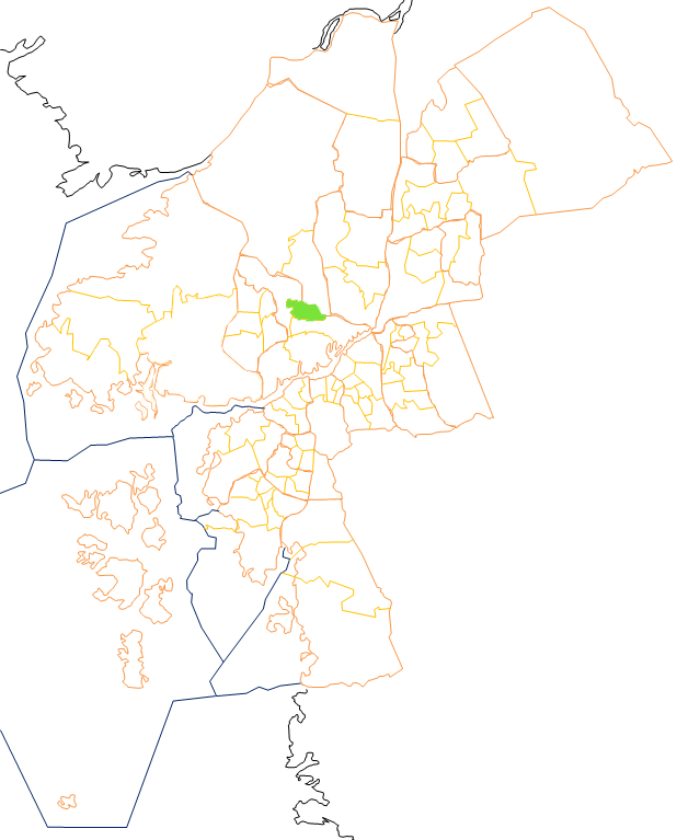 Karta som visar primärområdes belägenhet i Göteborg